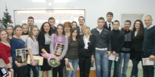 6 Ораторска вечер во АСУЦ „Боро Петрушевски“